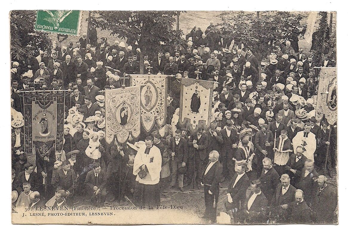 Fête-Dieu à Lesneven vers 1908.